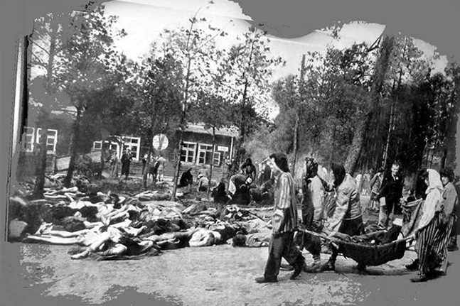 בתמונה רואים יהודים אסירים במחנה הריכוז "ברגן בלזן". מלחמת העולם השנייה.